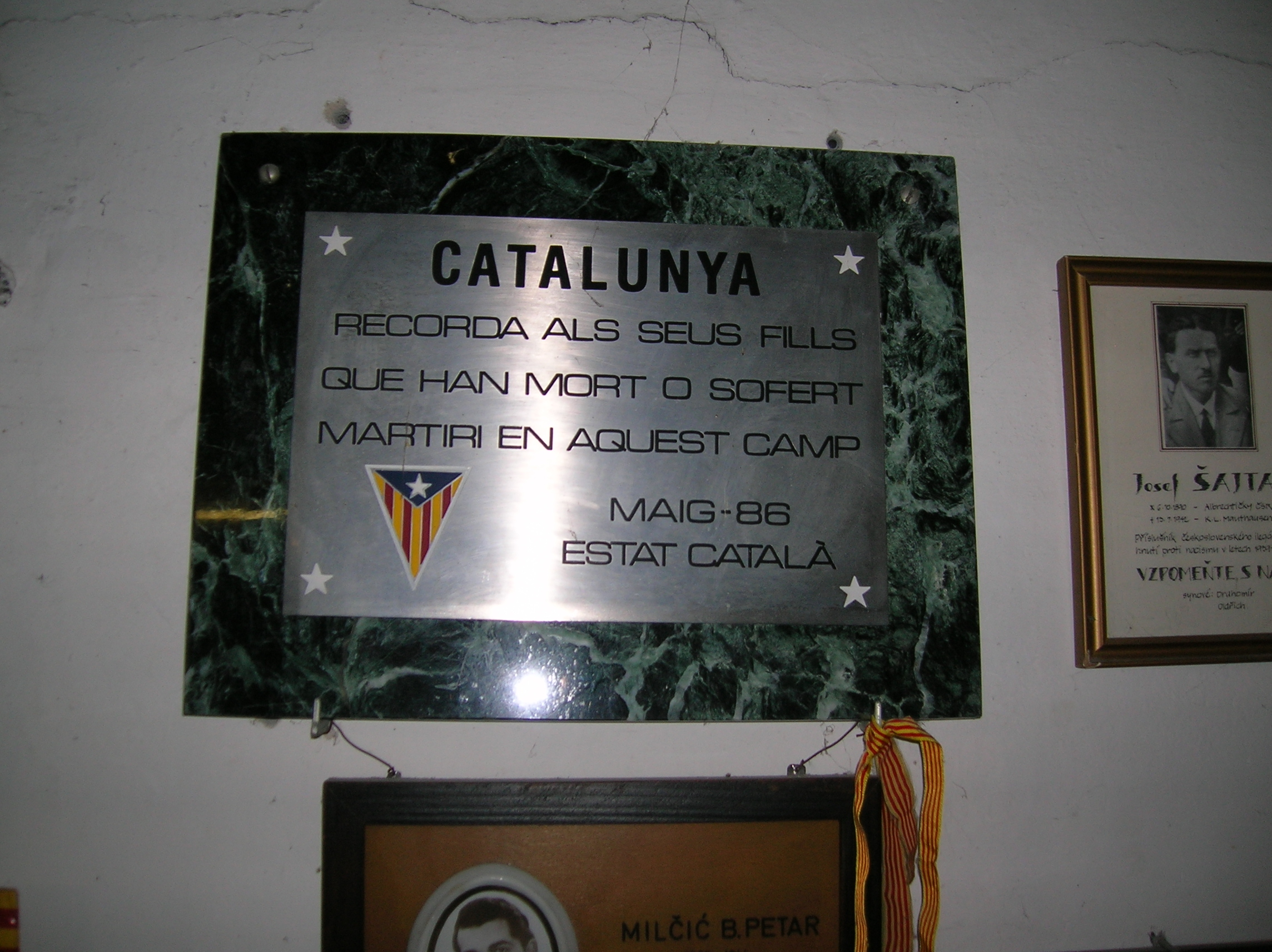 Konzentrationslager Mauthausen-Gusen